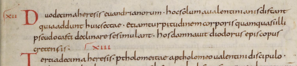 Praedestinatus. Глава XII. Секундиане. Рукопись IX века. Национальная библиотека Франции